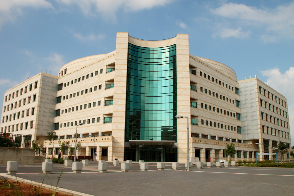 בניין אשפוז ב', המרכז הרפואי הלל יפה.